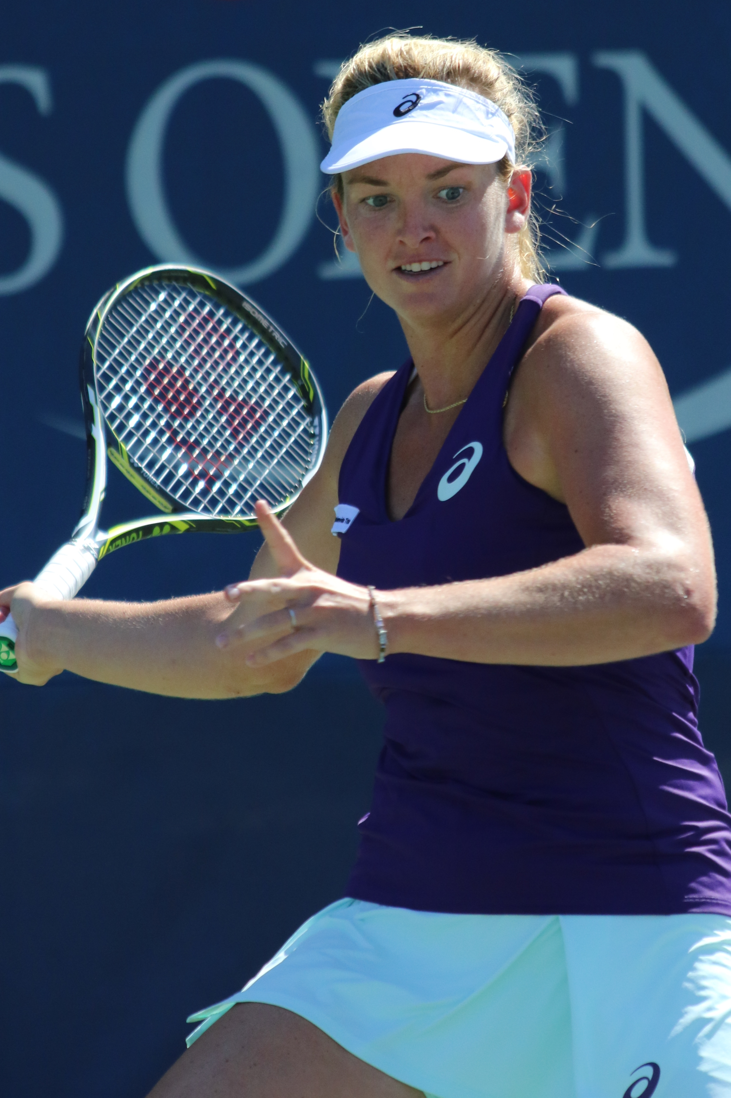 Vandeweghe US16 (9)